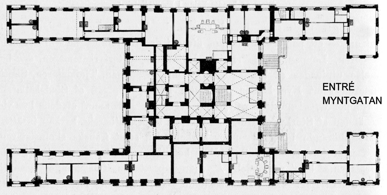 Bondeska palatset, planritning, bottenvåning när byggnaden innehöll Stockholms rådhus (1897)